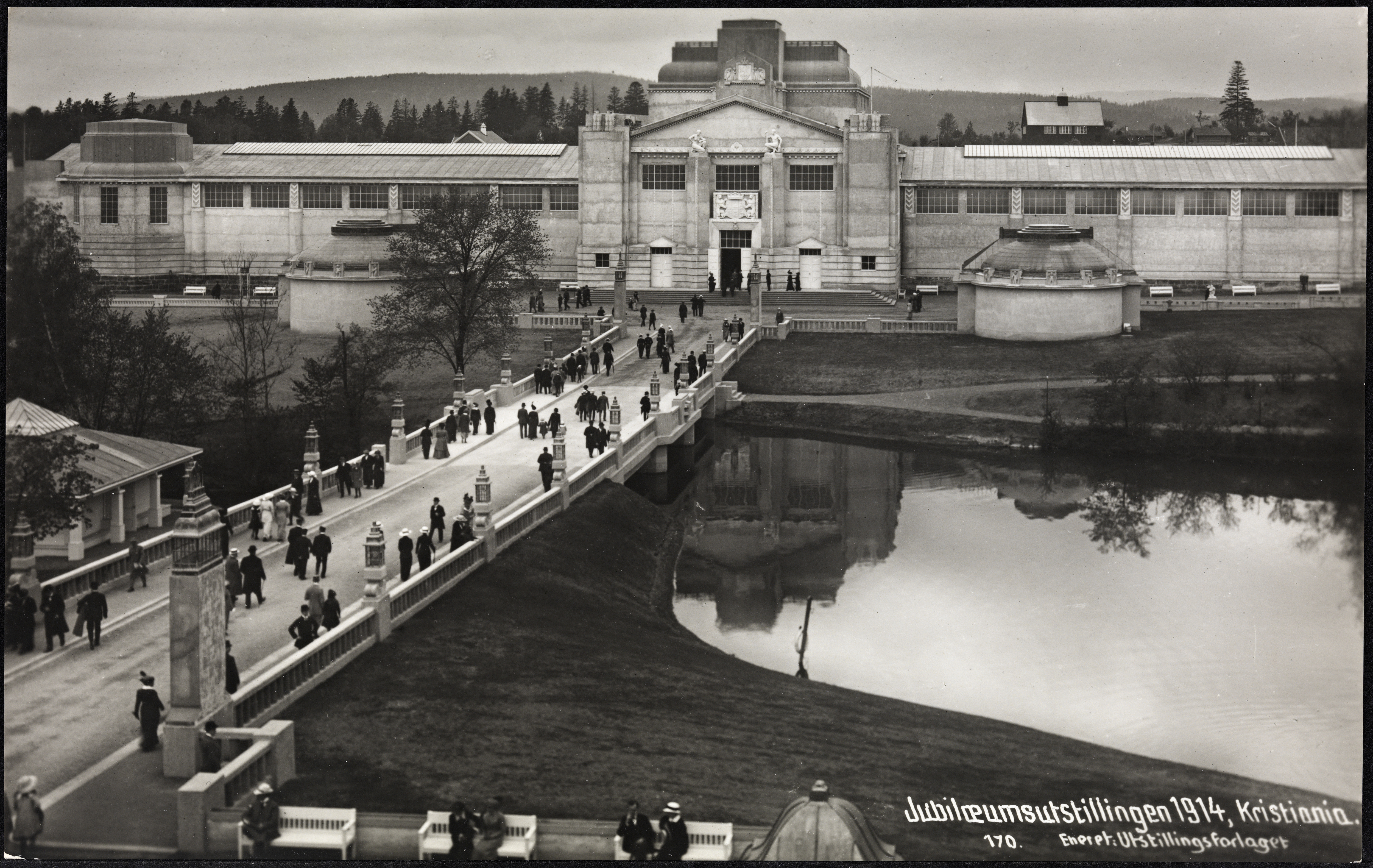 Dato / Date: 1914 Sted / Place: Oslo, Frogner Fotograf / Photographer: ukjent / unknown Utgiver / Publisher: Utstillingsforlaget Digital kopi av original / Digital copy of original: s/h postkort, sølvgleatin Eier / Owner Institution: Nasjonalbiblioteket / National Library of Norway Lenke / Link: Bildesignatur / Image Number: bldsa_PK10349